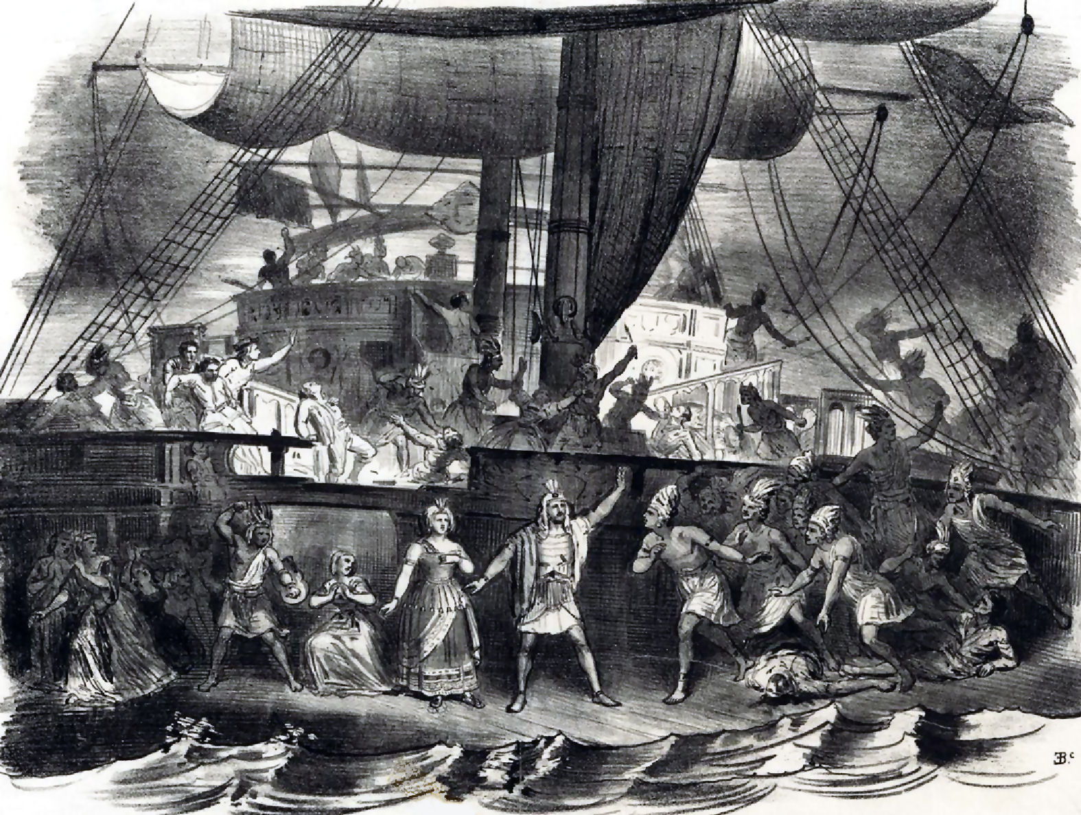 Acte III de L'Africaine de Meyerbeer (estampe)